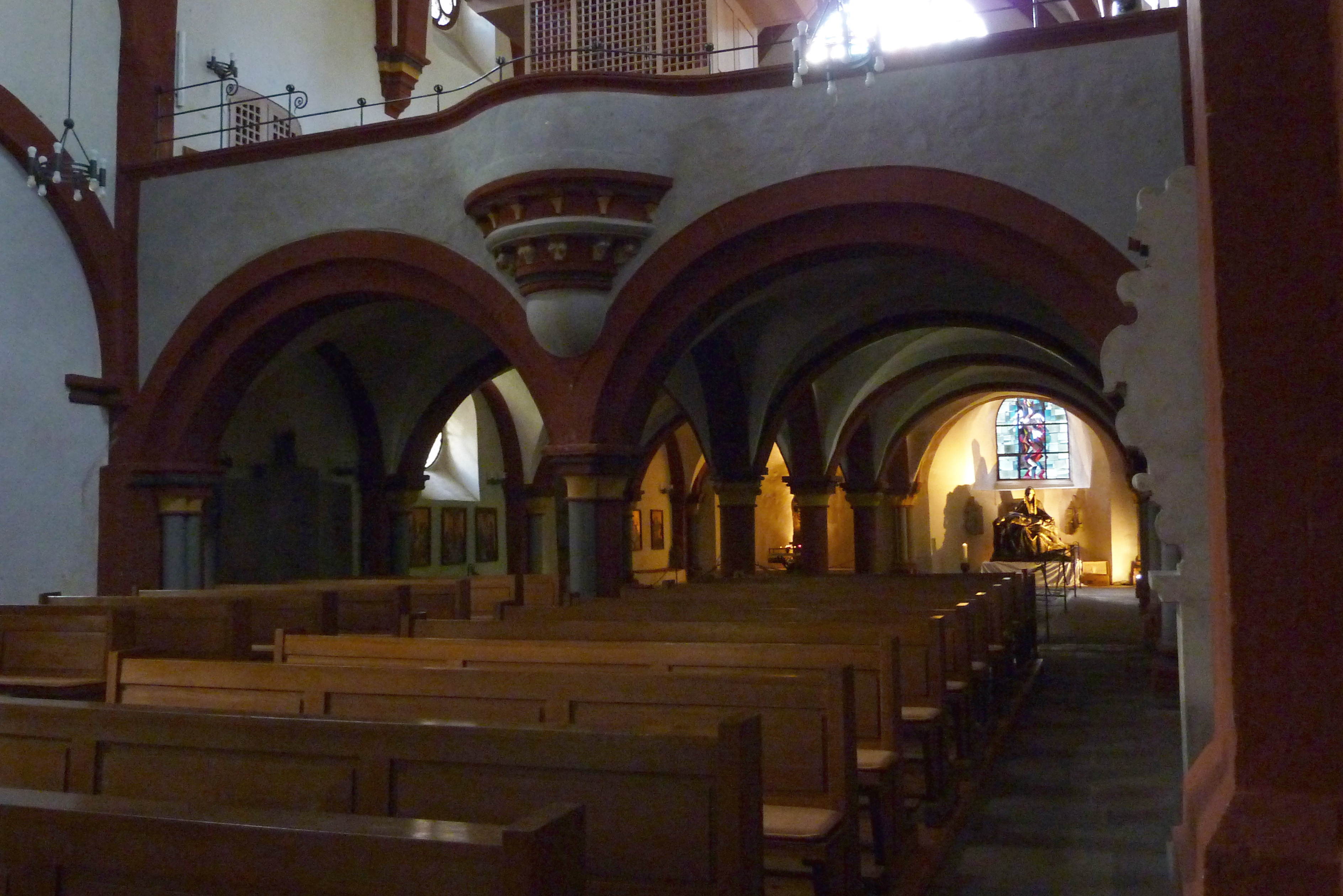 Ehemaliges Zisterzienserinnenkloster Sankt Thomas an der Kyll in Sankt Thomas im Eifelkreis Bitburg-Prüm (Rheinland-Pfalz), Innenraum mit Blick zum Laienraum unter der Nonnenempore